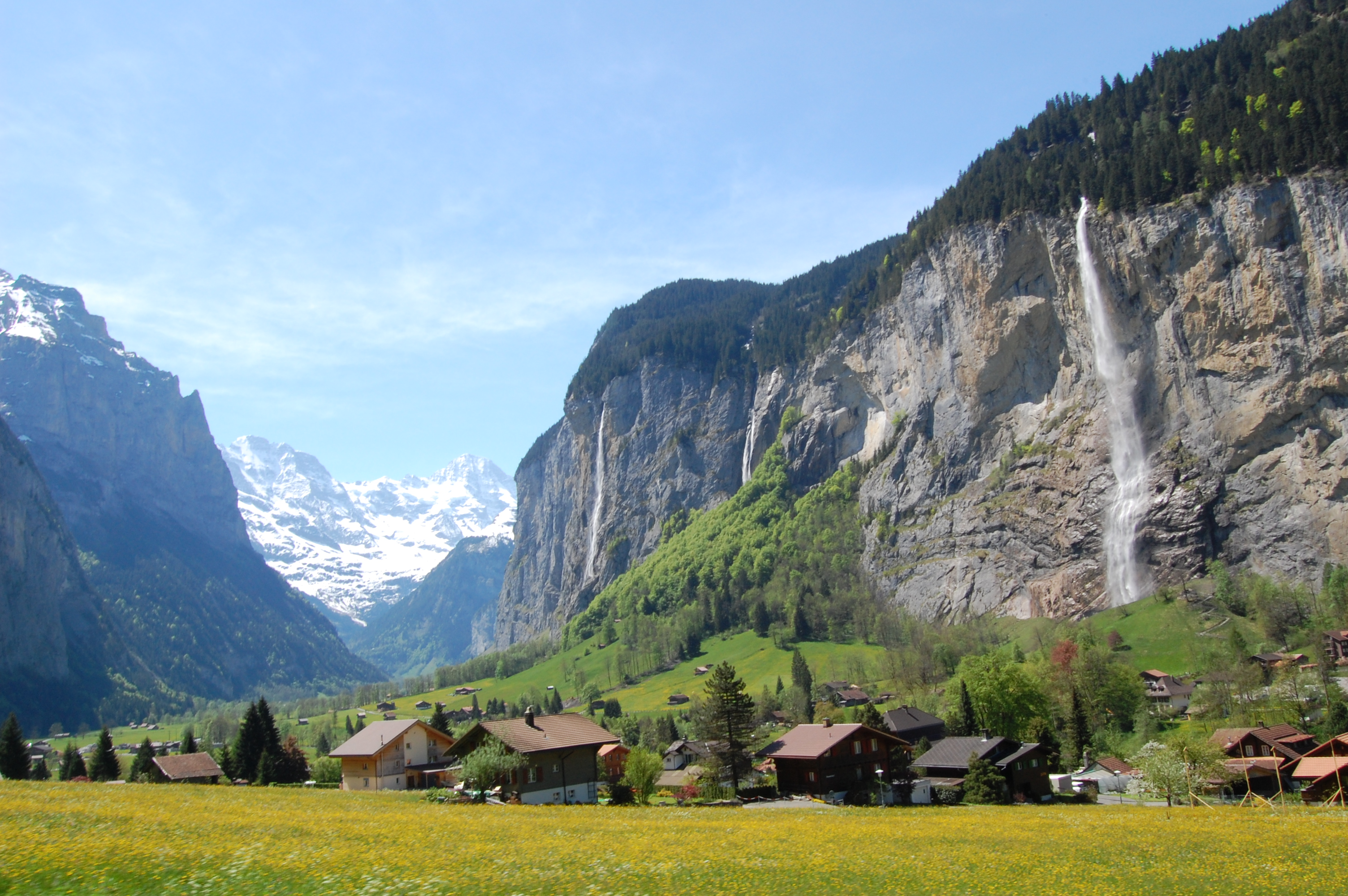 Lauterbrunnen, Bernese Oberland